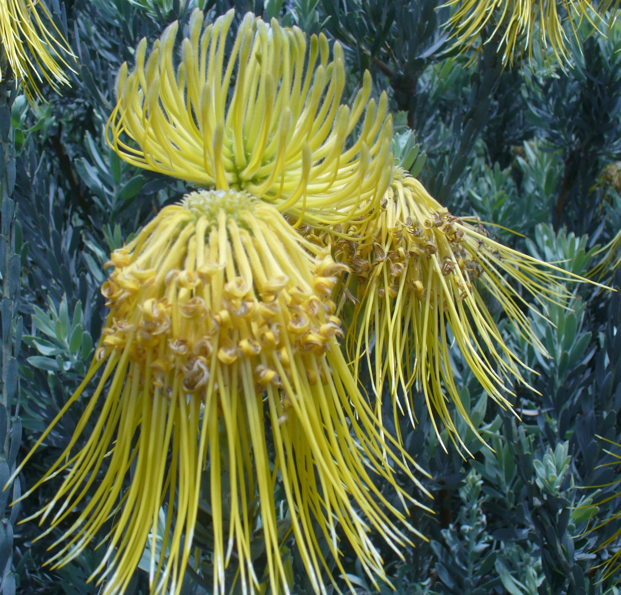 Leucospermum reflexum var. luteum Kirstenbosch 2006 Andrew Massyn